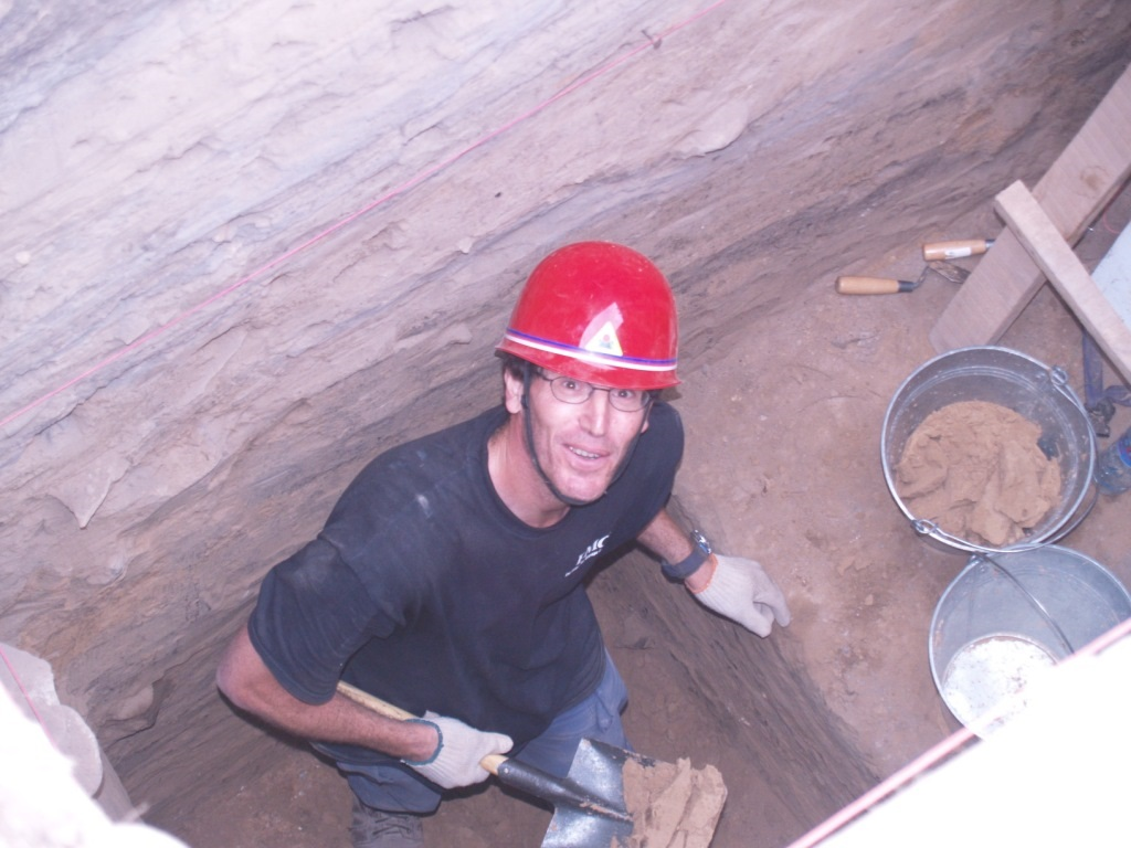 גדעון שלח בחפירות באזור צ'ה-פנג, מונוגוליה הפנימית, 2002